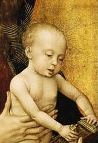 Madonna and Child Rogier van der Weyden (Crop)